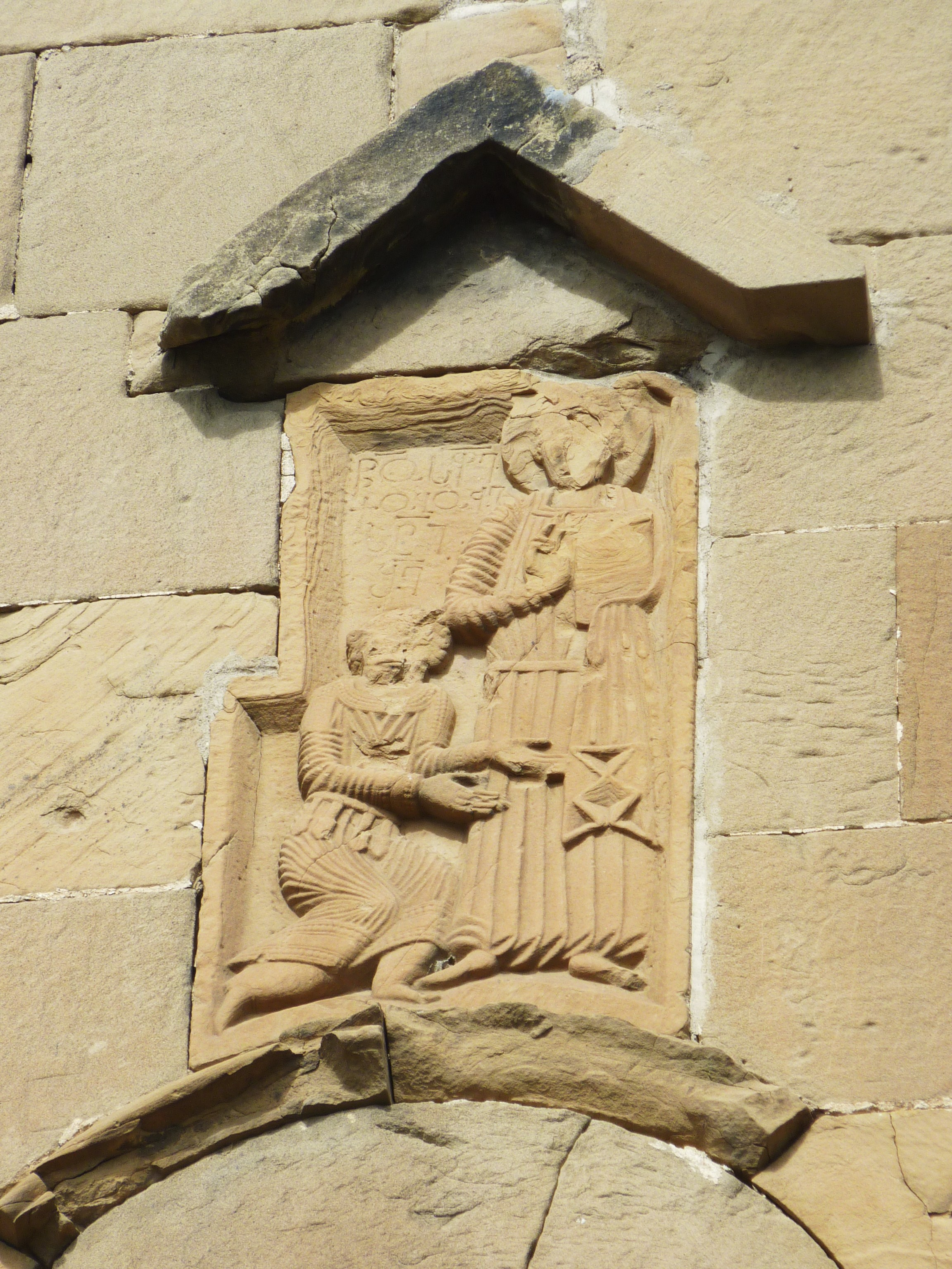 Monastère de Djvari Sculptures au-dessus de la fenêtre dominant la porte d'entrée